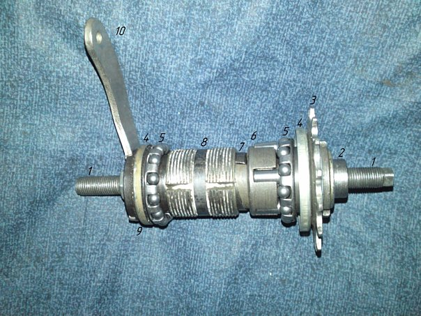 Втулка односкоростная в разборе (от велосипеда ММВЗ): 1. Ось; 2. Конус правый; 3. Звёздочка; 4. Пыльники; 5. Подшипники шариковые насыпные; 6. Конус ведущий (часть обгонной муфты); 7. Конус тормозной; 8. Колодки тормозные пружинные; 9. Конус левый; 10. Рычаг тормозной